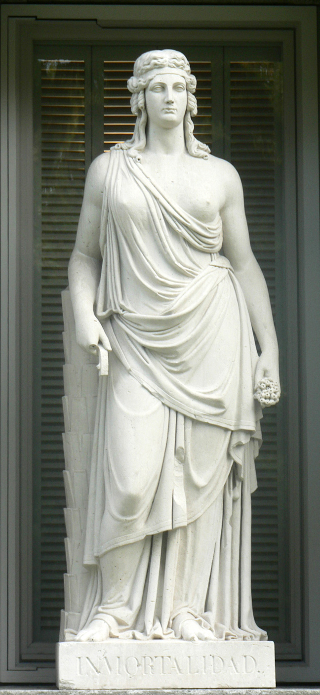 Estatua alegórica de la Inmortalidad, esculpida en mármol entre 1830 y 1836, por Valeriano Salvatierra, en la fachada del Museo del Prado, Madrid.